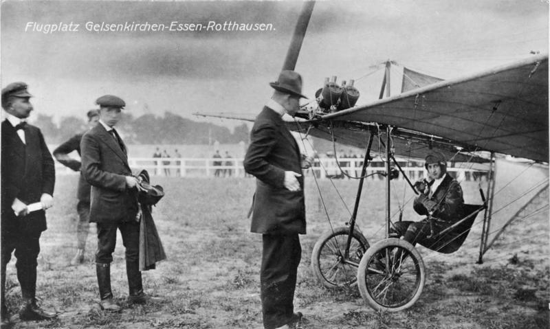 Eine neue deutsche Pilotin Fräulein Charlotte Möhring hat auf dem Essener Flugplatz das Pilotenzeugnis erworben. Flugplatz Gelsenkirchen-Essen-Rotthausen. 1912